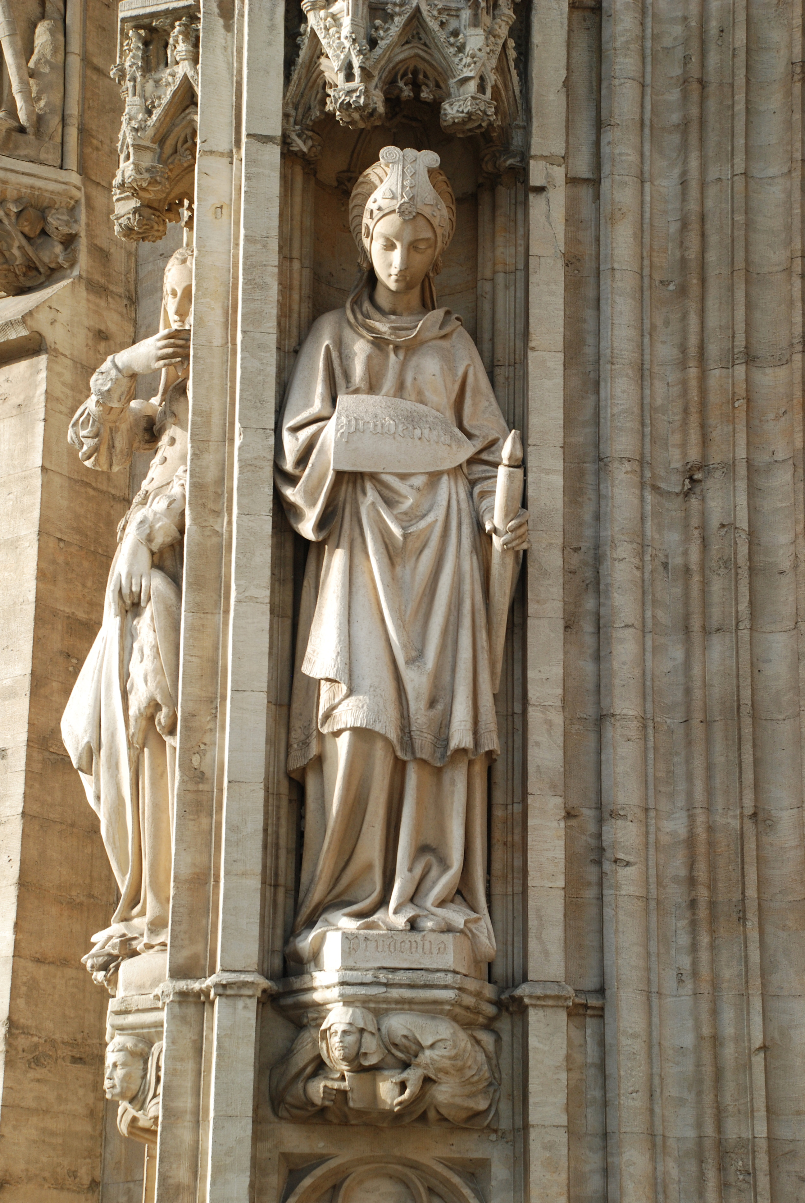 Belgique - Bruxelles - Hôtel de ville de Bruxelles - Vertus - Pax and Prudentia